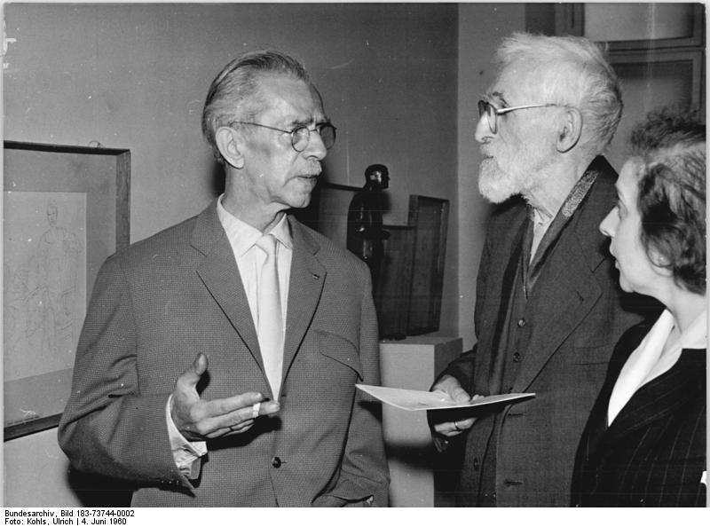 Berlin, AdK-Ausstellung, Nagel, Hamann Zentralbild Kohls 4.6.1960 Ausstellung der Akademie der Künste Zum sechzehnjährigen Bestehen zeigt die Deutsche Akademie der Künste Werke ihrer Ordentlichen und Korrespndierenden Mitgliedern der Sektion Bildende Kunst. Die Ausstellung wird am 3.6.1960 in den Räumen der Akademie am Robert-Koch-Platz eröffnet. UBz: Der Präsident der Akademie Otto Nagel (links) im Gespräch mit dem bekannten Kunsthistoriker Prof. Hamann Abgebildete Personen: Nagel, Otto Prof.: Maler, Präsident der Akademie der Künste (AdK), Nationalpreisträger, Vaterländischer Verdienstorden (VVO) in Gold, DDR (GND 118586300)